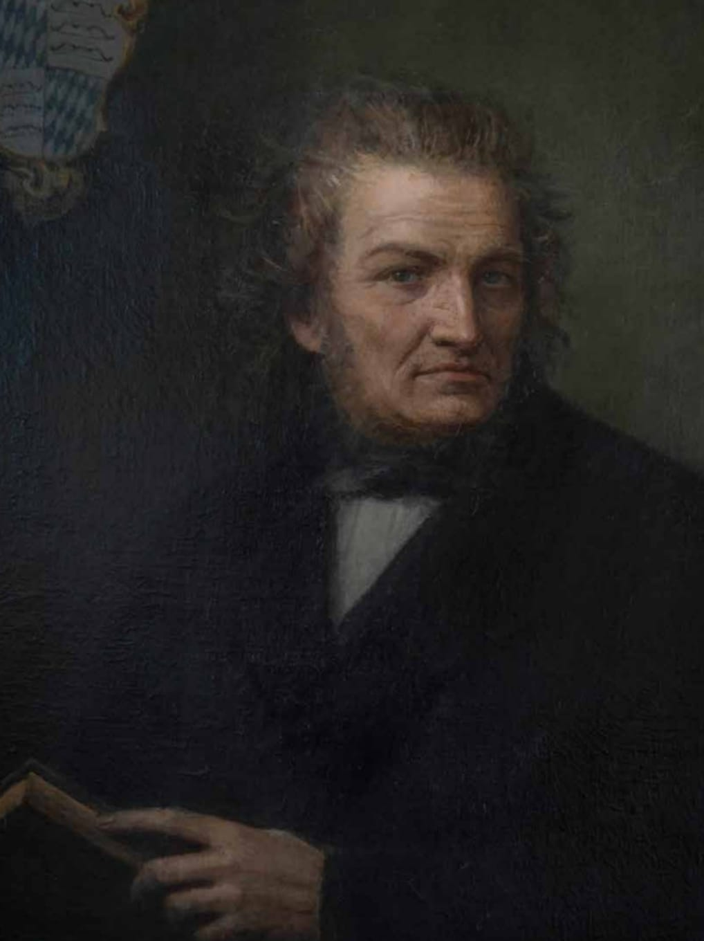 Ritratto di Luigi d’Arco (1795-1872)